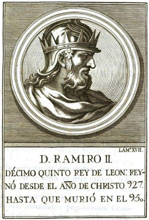 Retrato de 'Ramiro II, décimo quinto rey de León, ilustración del libro (escaneado por Google) Retratos de los reyes de España, desde Atanarico hasta ... D. Carlos III.